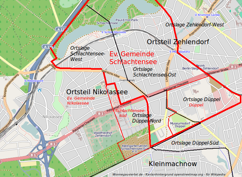 Karte der Ev. Gemeinde Schlachtensee